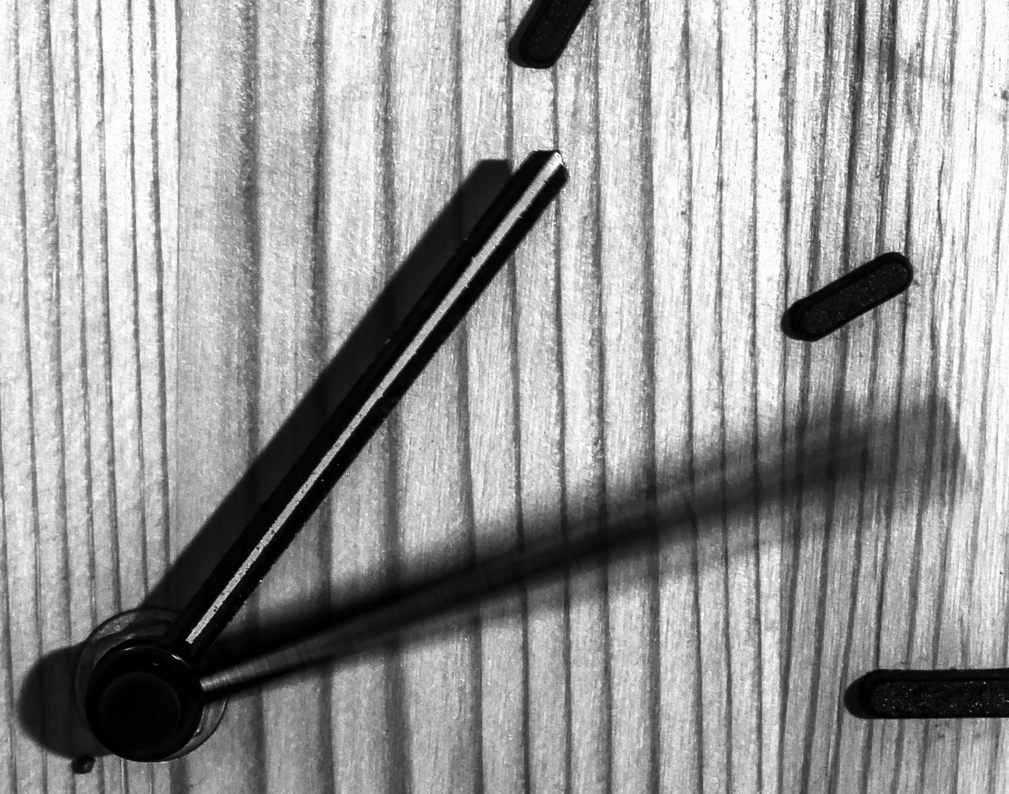 Klockvisare, lång slutartid.